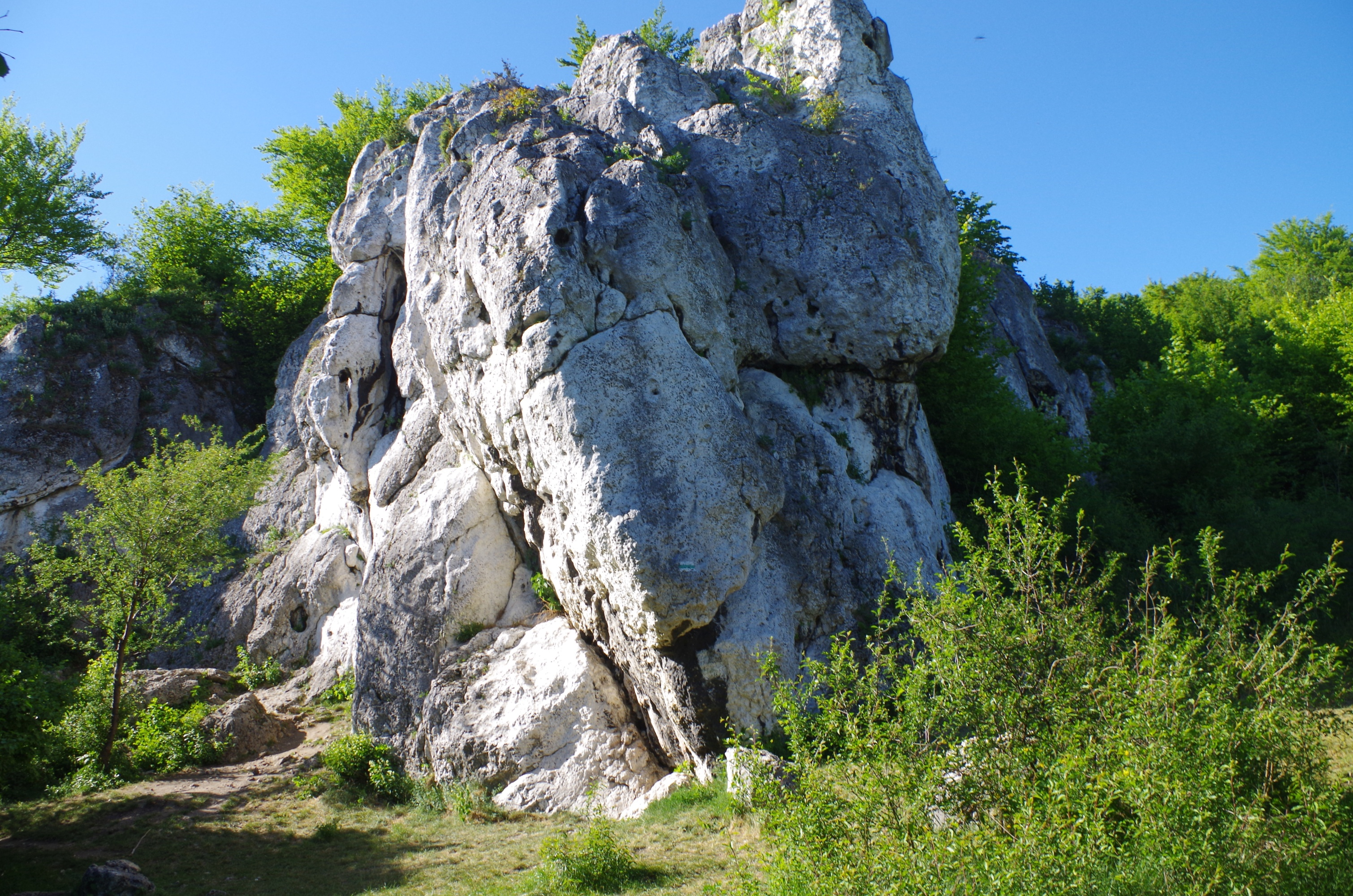 Skały Rzędkowickie. Narożna